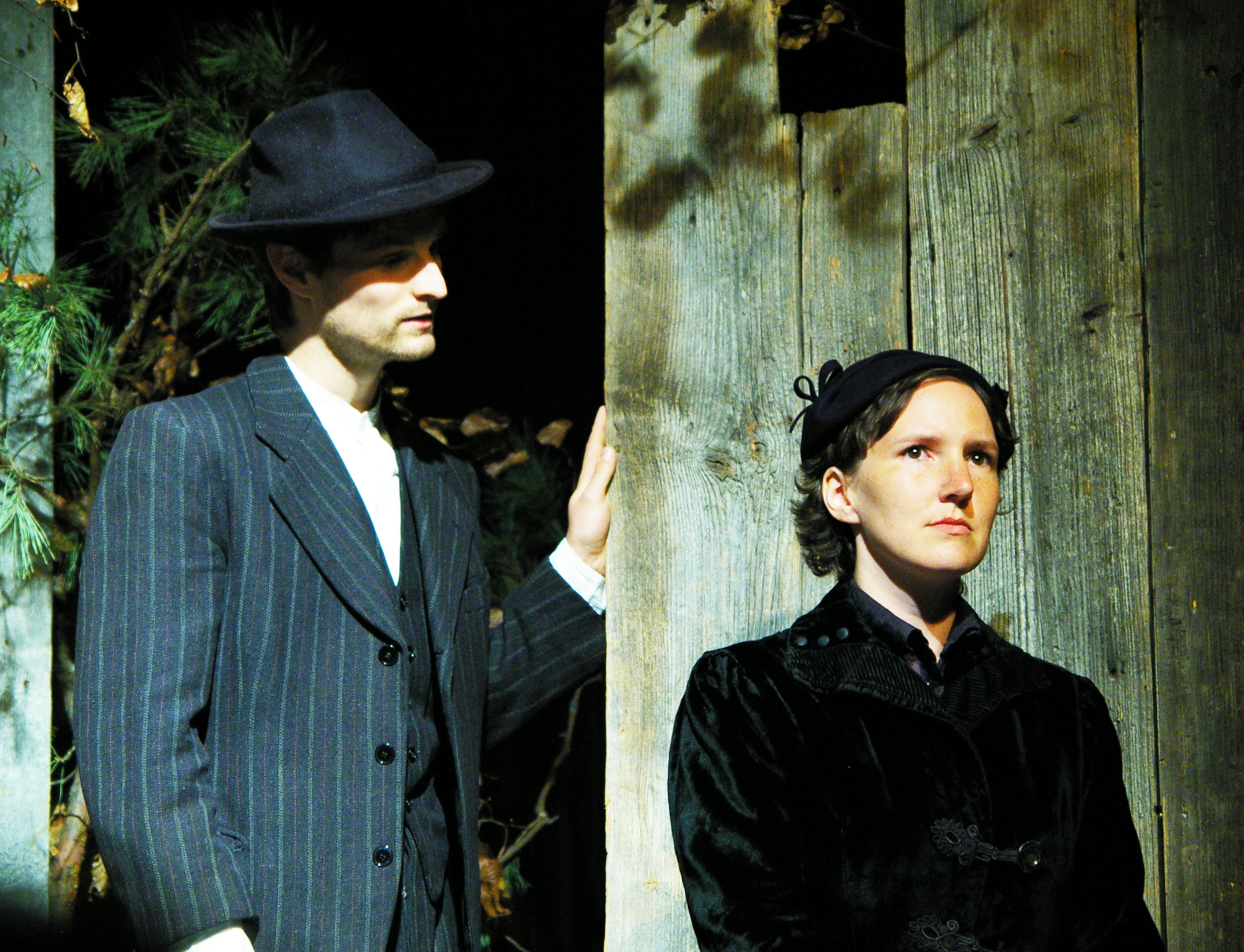 Theater Holzhausen-Kleinhäuslergeschichte